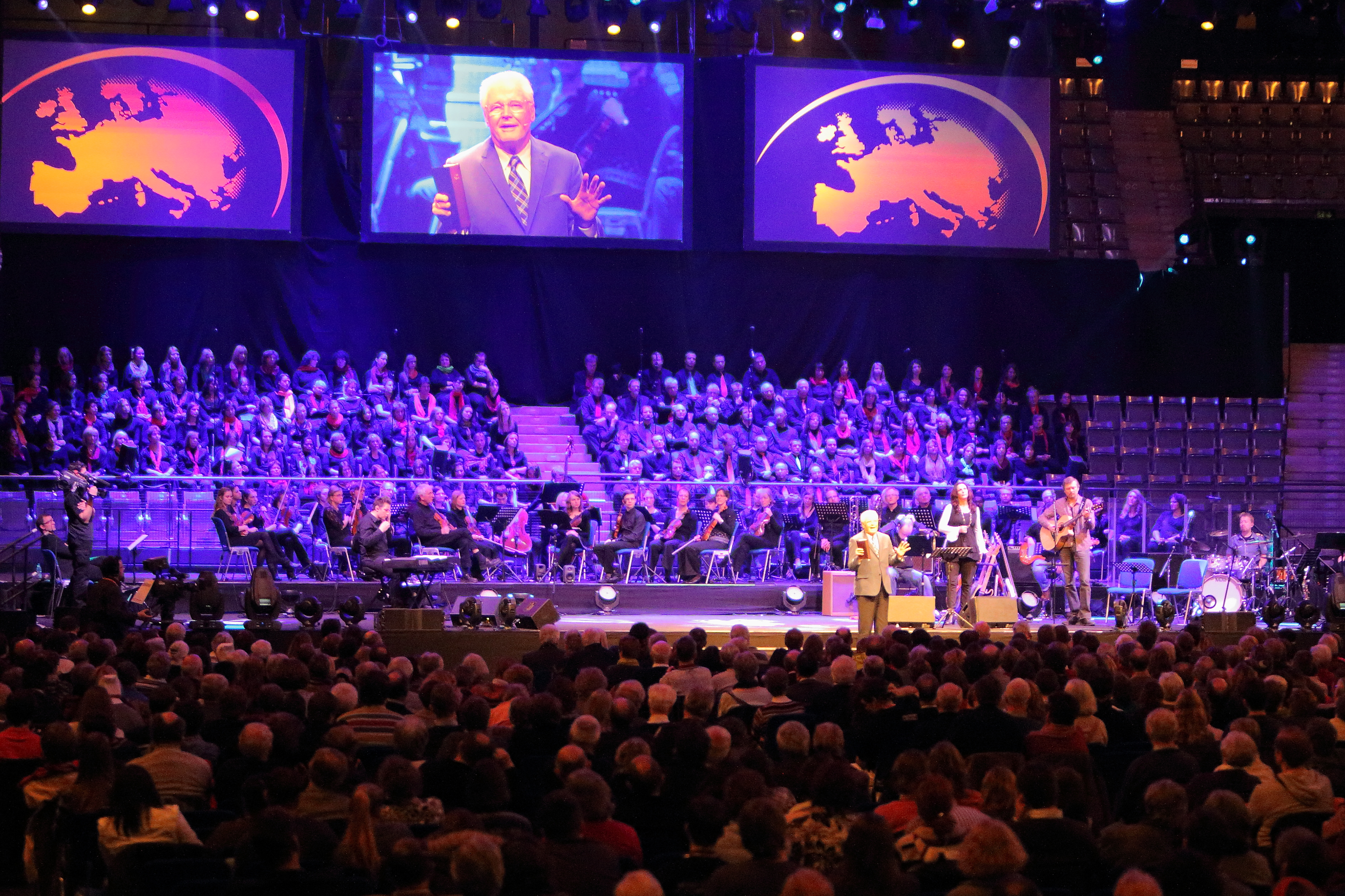 Impression aus der Porsche-Arena (ProChrist 2013)